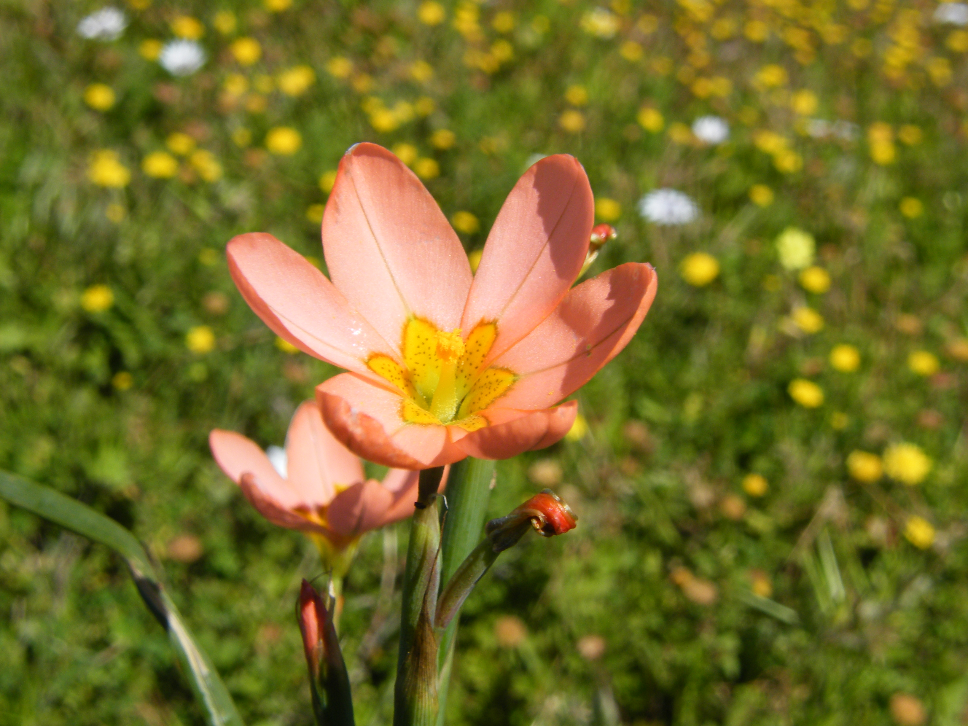 Pronk tulp